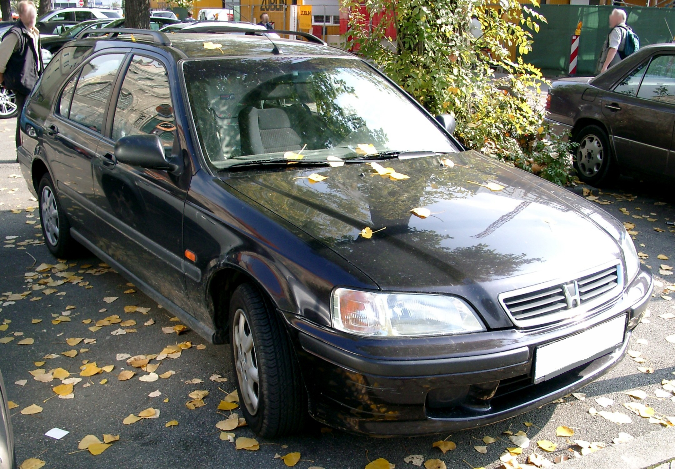 Honda Civic, Aerodeck, 6. Generation